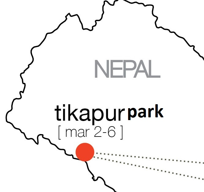 नेपाल भाषा: TikapurPark